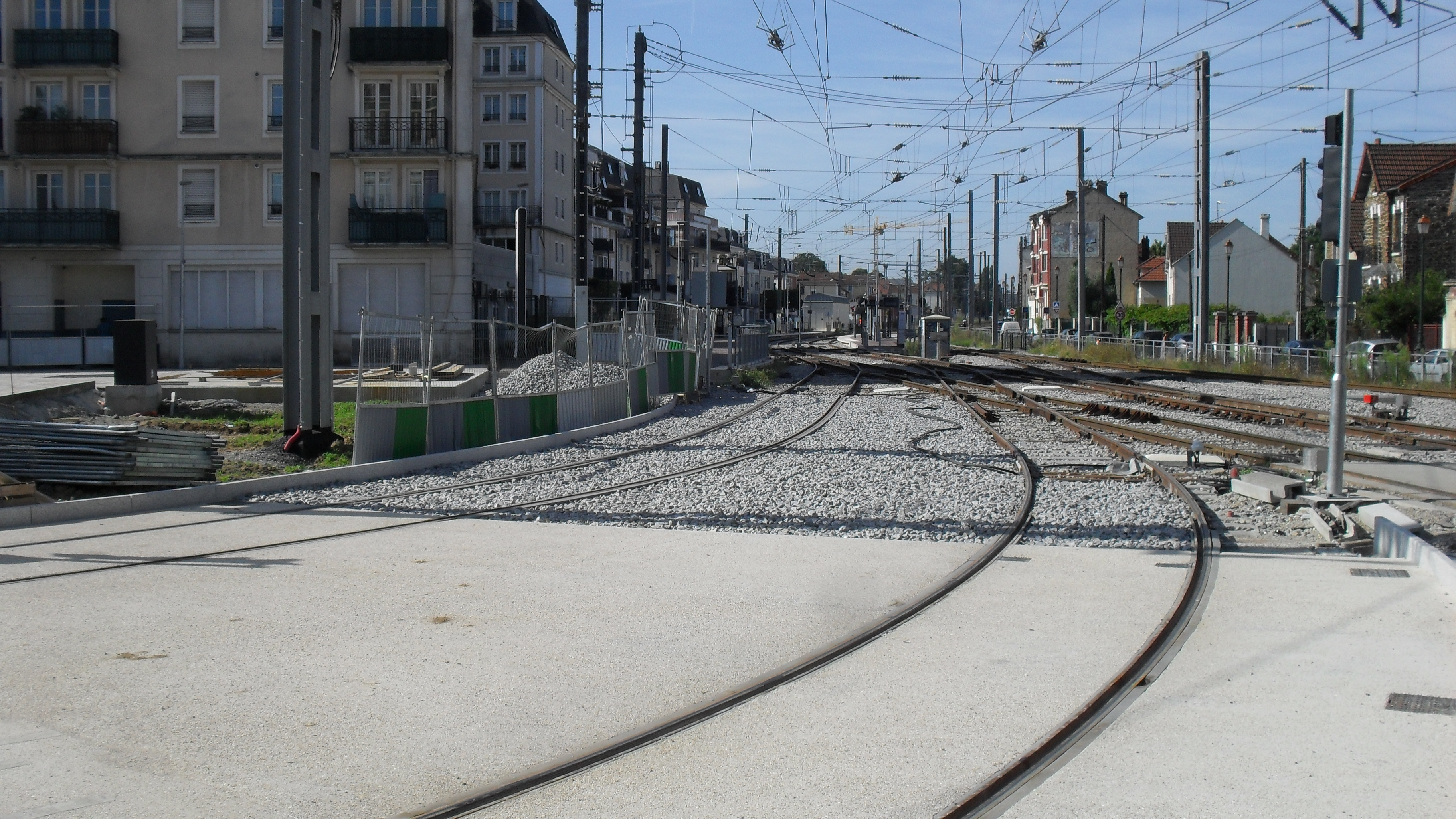 Vue de la naissance de la branche vers Montfermeil, en direction de Bondy